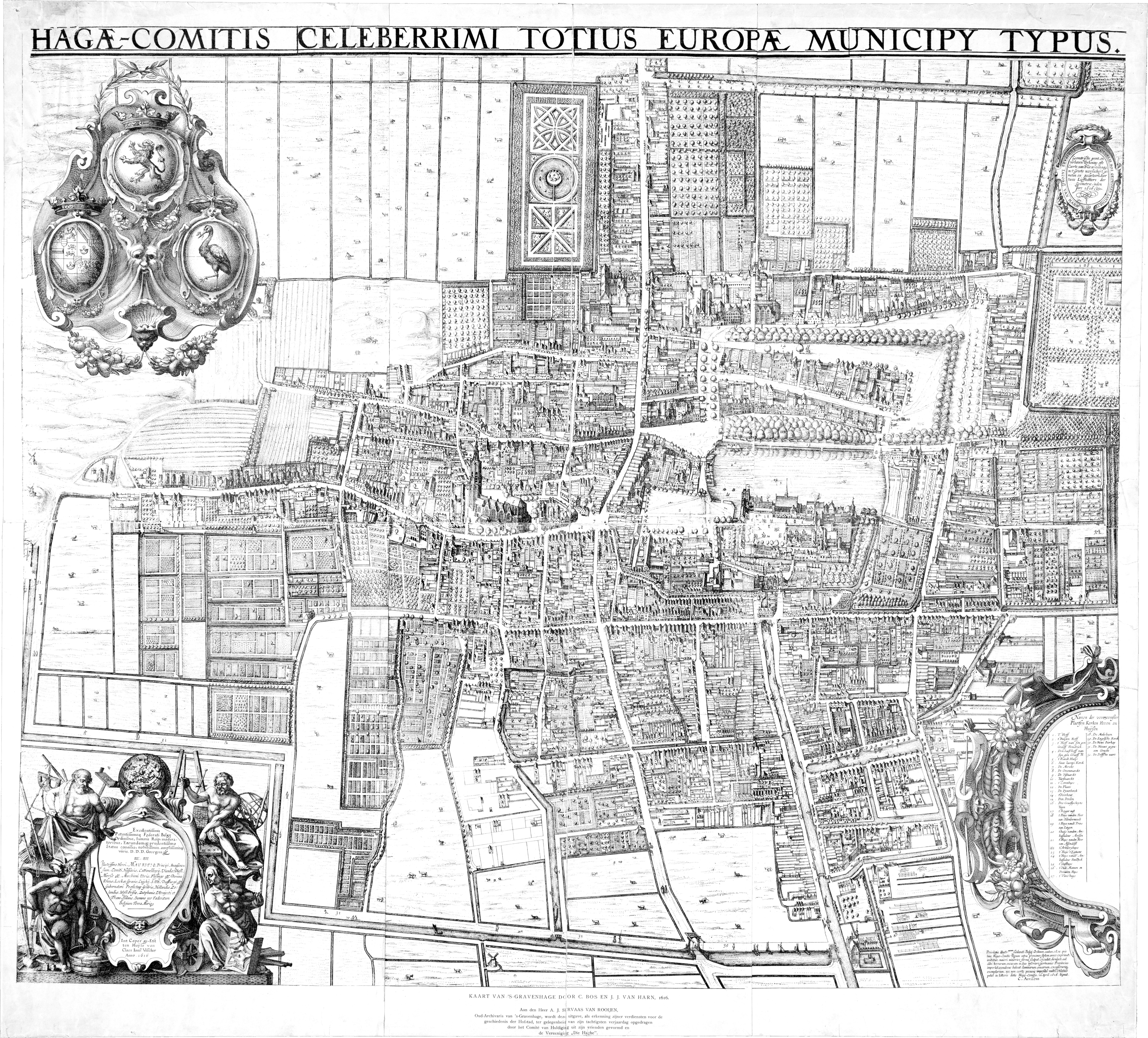 Herdruk van een kaart uit 1616 105 x 125 cm 1616 1919 (herdruk) herdruk is opgedragen aan A.J. Servaas van Rooijen, oud-archivaris van Den Haag